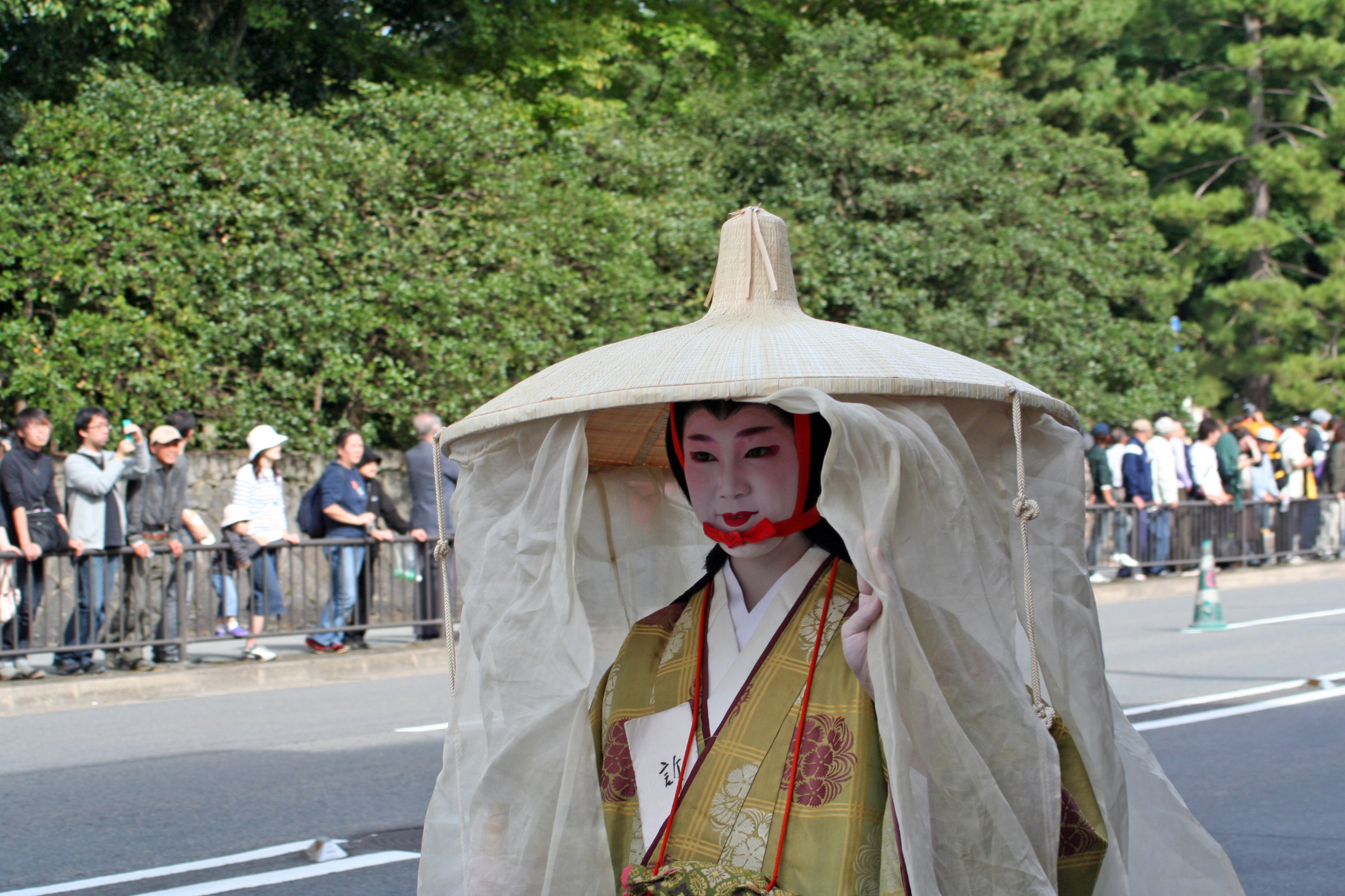 京都府京都市にて開催された時代祭。正午の御所から平安神宮までの行進の様子。2009年10月22日撮影。